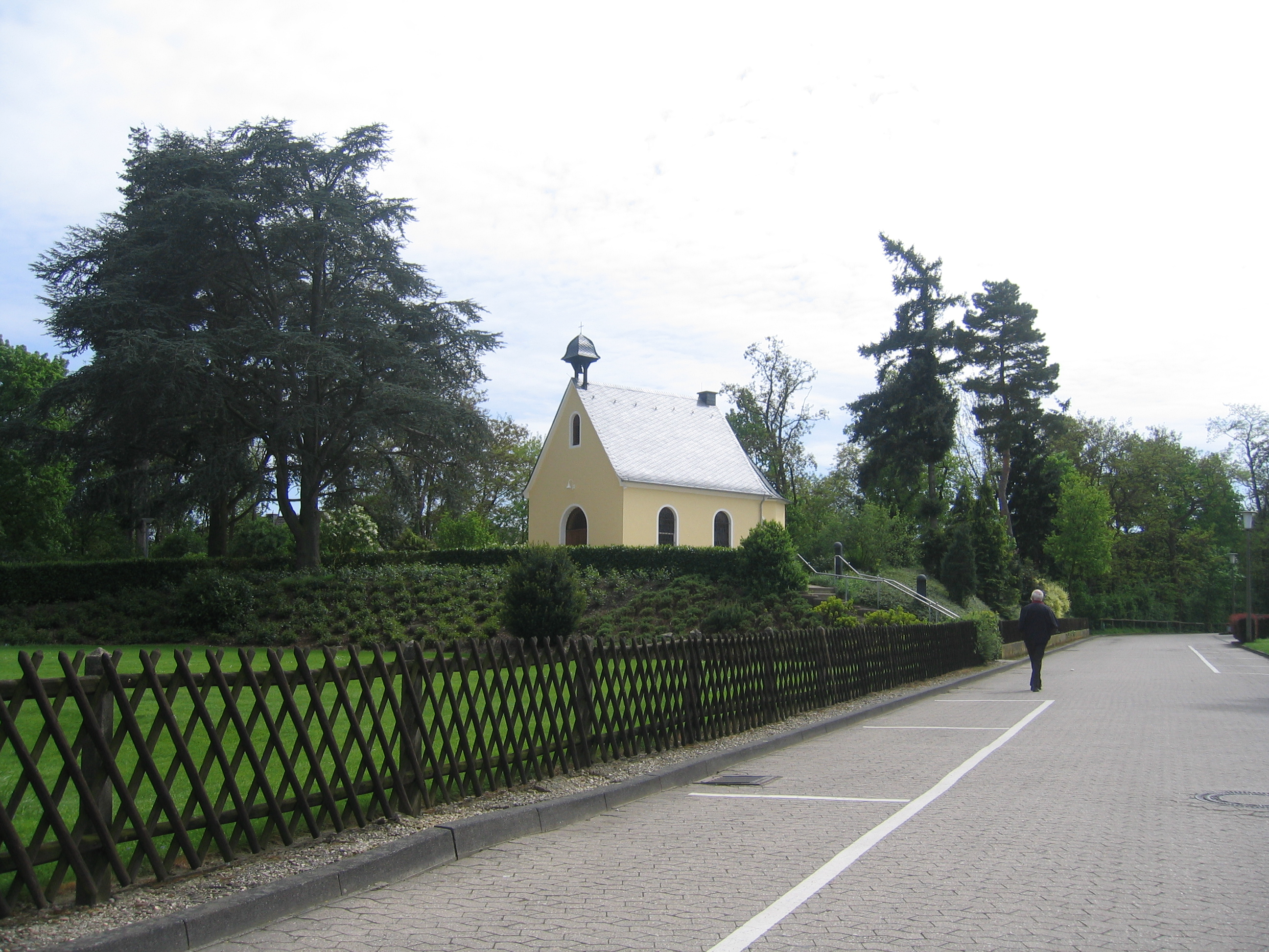 Kapellenhügel des Vinzenz Pallotti Kollegs Rheinbach, betrachtet aus der Nähe des Haupteingangs der Schule